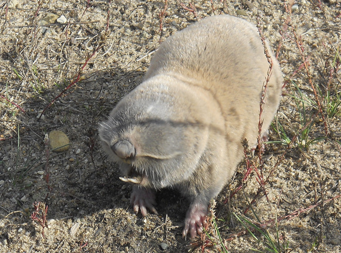 Слепыш обыкновенный под Сызранью